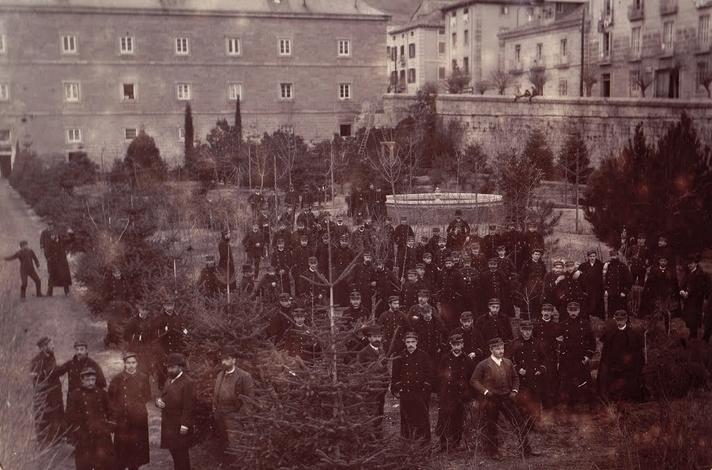 Foto de 1887 en "El Corralón" de la Escuela Especial de Ingenieros de Montes del Escorial (entre la primera Casa de Oficios y el muro de la calle Floridablanca), en la que se ve a los profesores y a los alumnos con los uniformes reglamentarios. Descripción en la fuente, pp:45: : “...dimensiones de 29,5 x 36 cm aproximadamente, con el paspartu en el que aparece ESCUELA ESPECIAL DE INGENIEROS DE MONTES 1887, y en letras más pequeñas J. DAVID 90 rue Courcelles a Levallois – Paris. Las dimensiones de la ventana de la propia fotografía son de 16,5 x 23 cm aproximadamente y en ella aparece representado El Corralón, solar de antiguos cuarteles arruinados durante la Guerra de la Independencia y lugar en donde se instaló un pequeño arboreto.../...Además de la variada vegetación plantada en el arboreto, y de la artística fuente que debía servir para los imprescindibles regadíos, destaca en la imagen la completísima galería que supone el elevado número de alumnos y profesores retratados...”